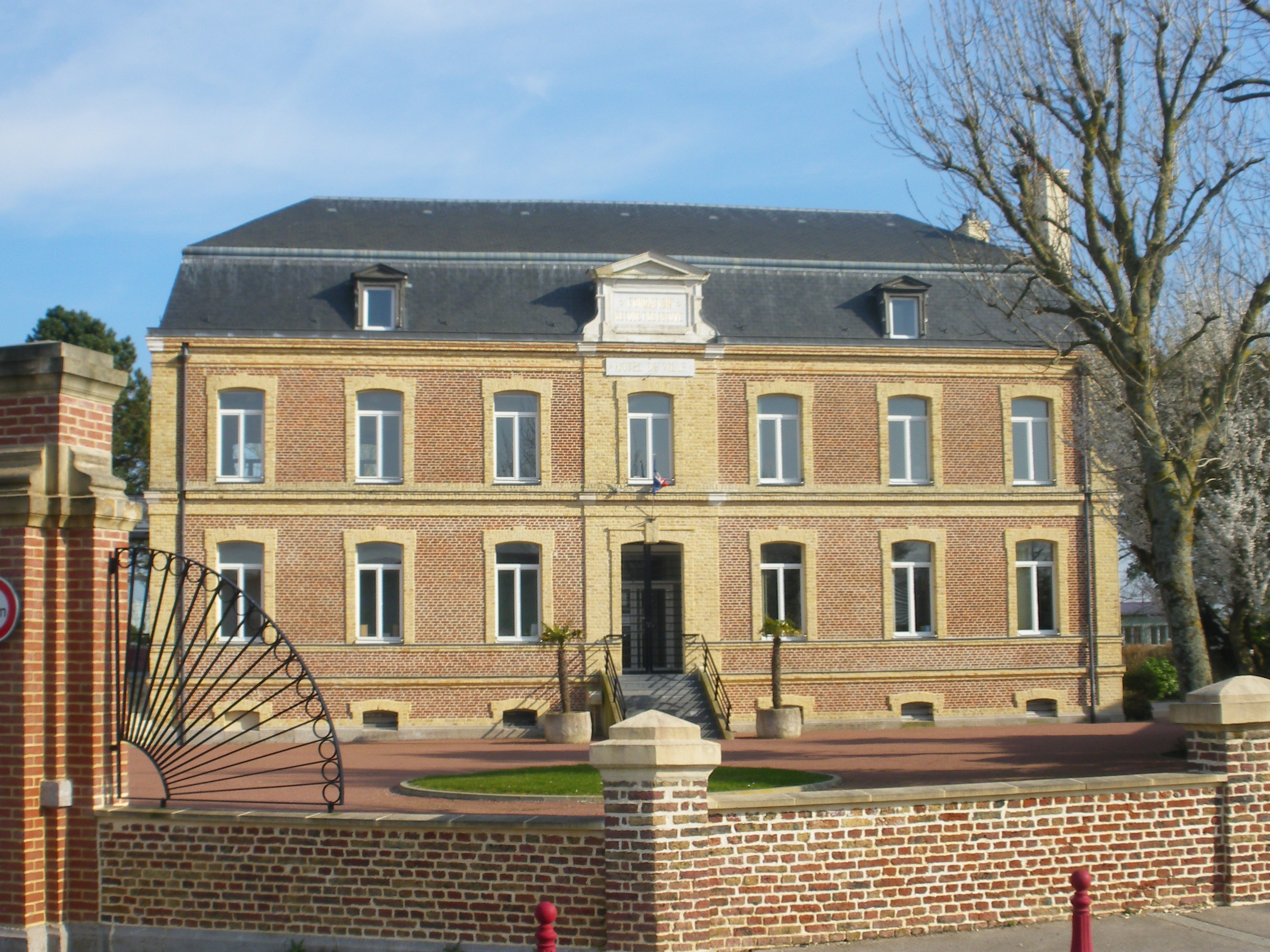 Vue de la mairie de Fréthun.